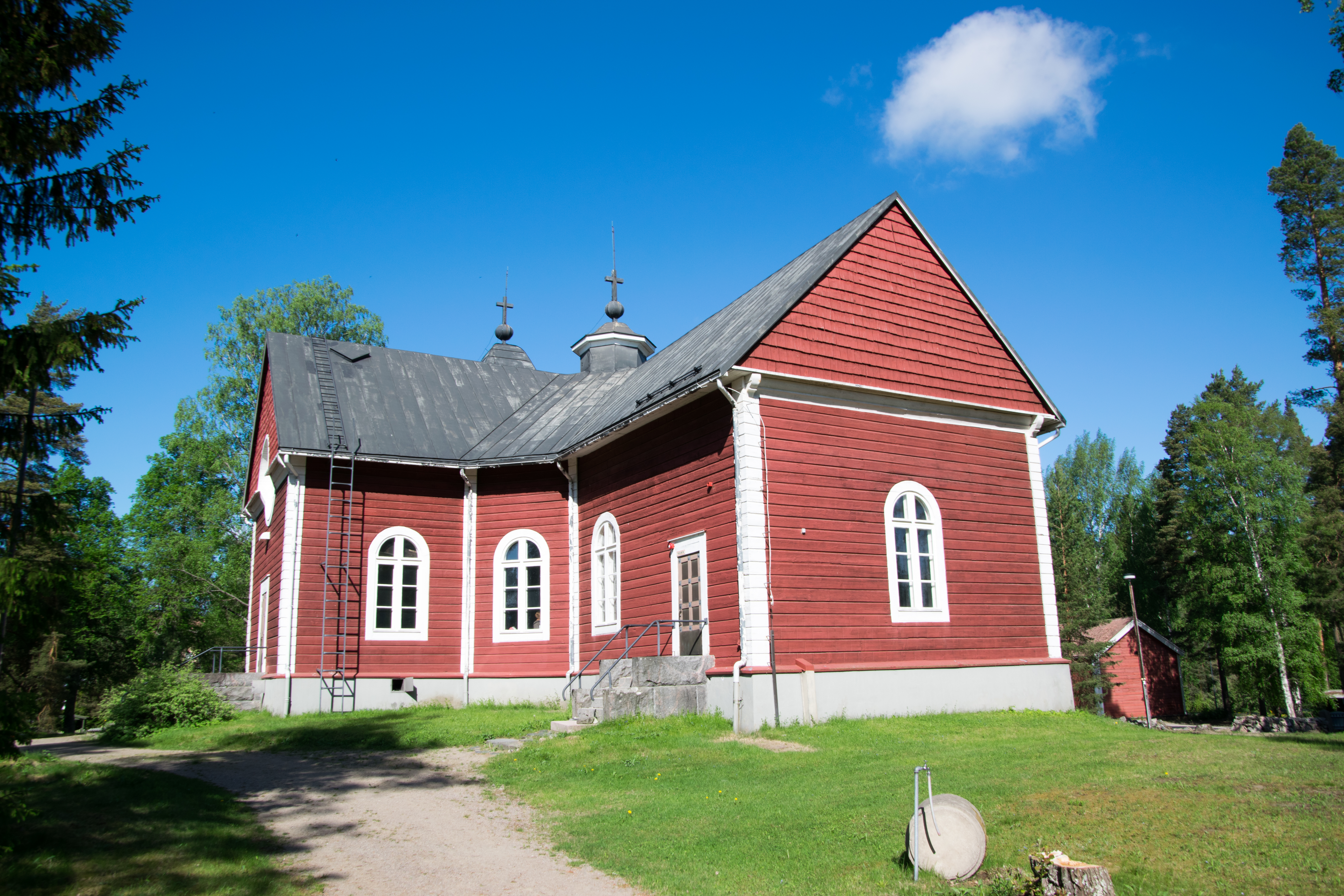 Pukkilan kirkko